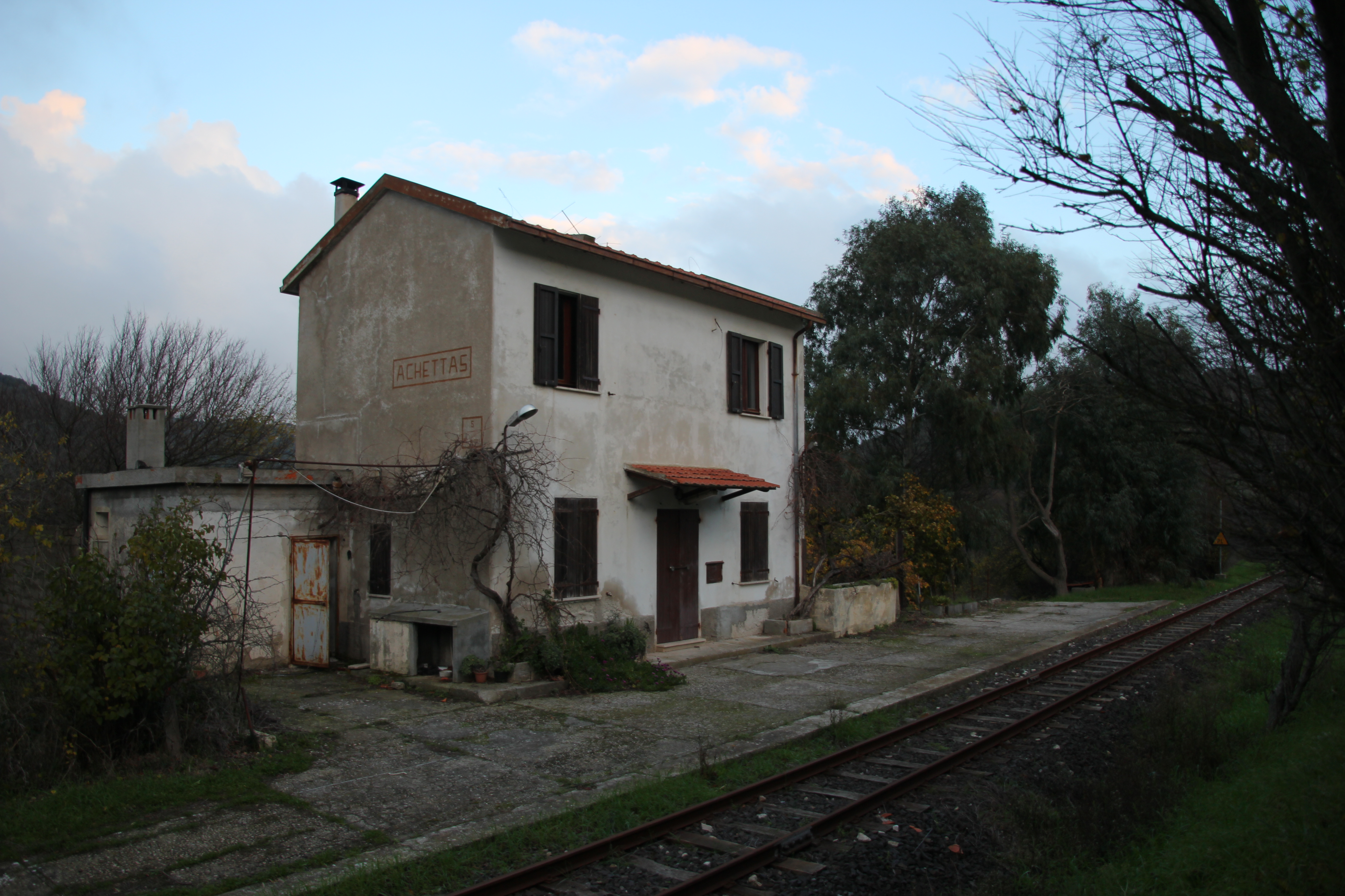 Sassari - Stazione ferroviaria di Achettas